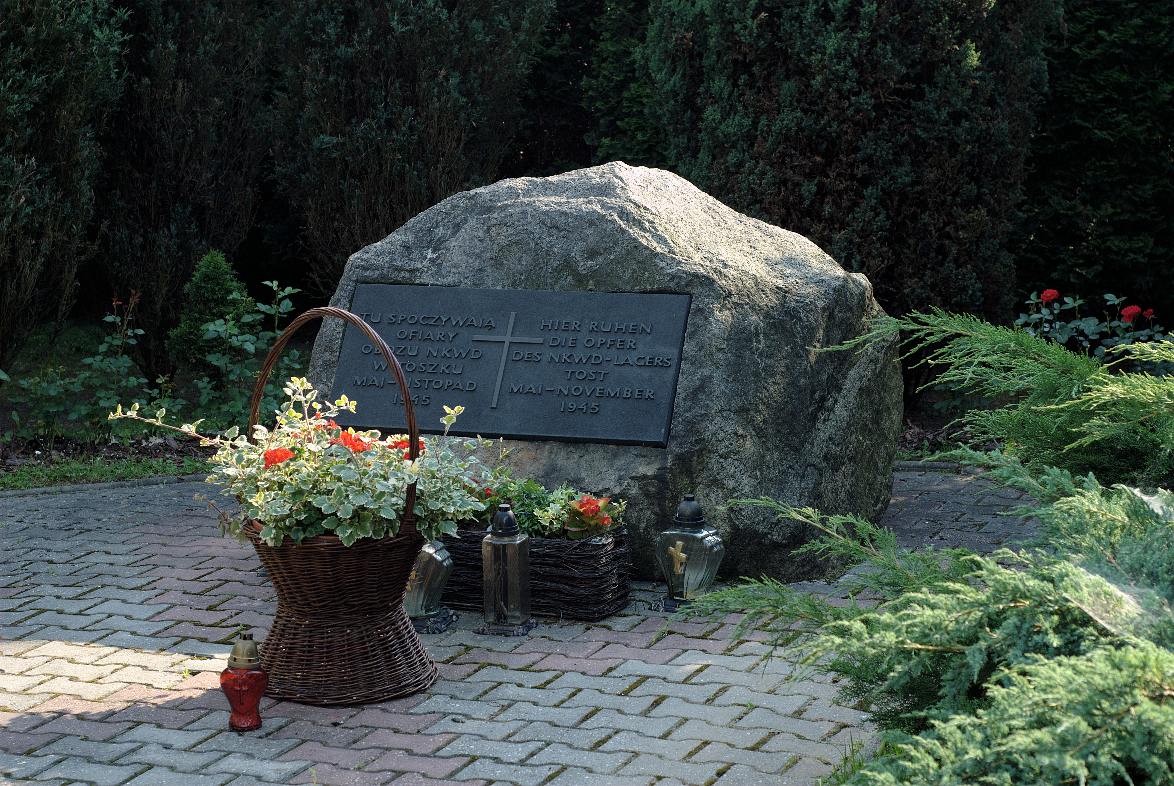 Toszek. Mogiła zbiorowa ofiar obozu NKWD.